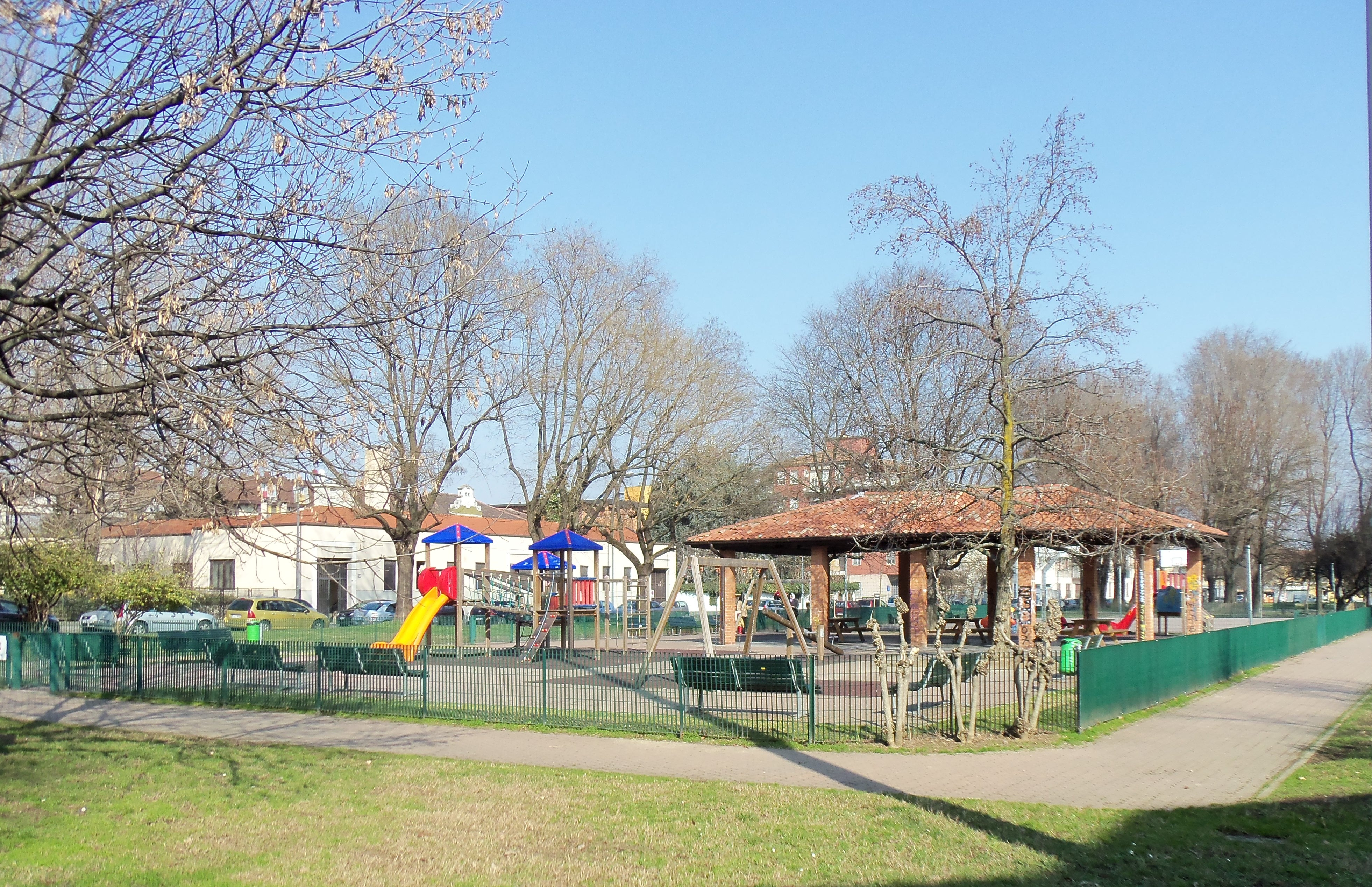 Milano, parco di Baggio